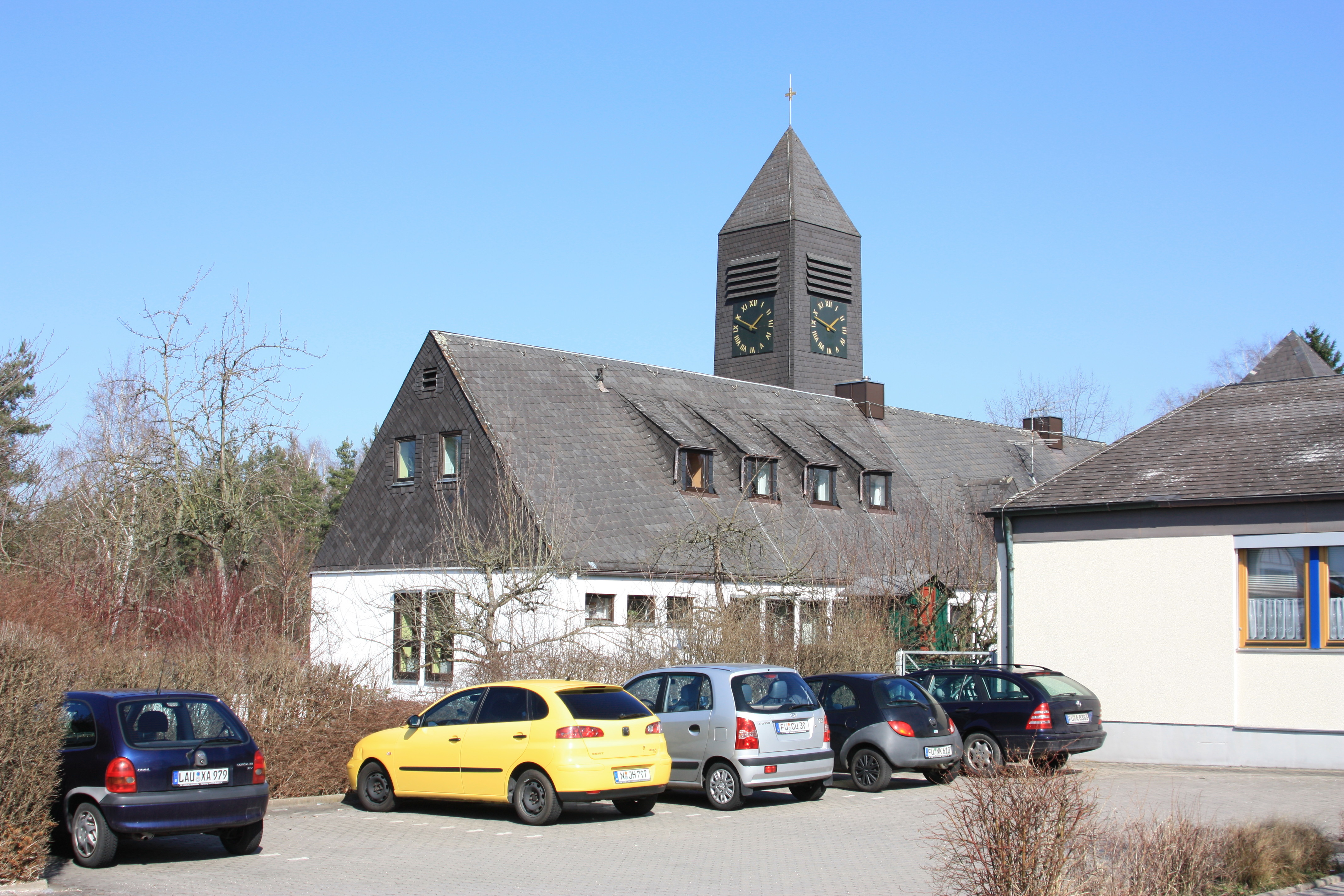 Oberasbach OT Unterasbach, evangelisch-lutherische Pfarrkirche St. Stephan